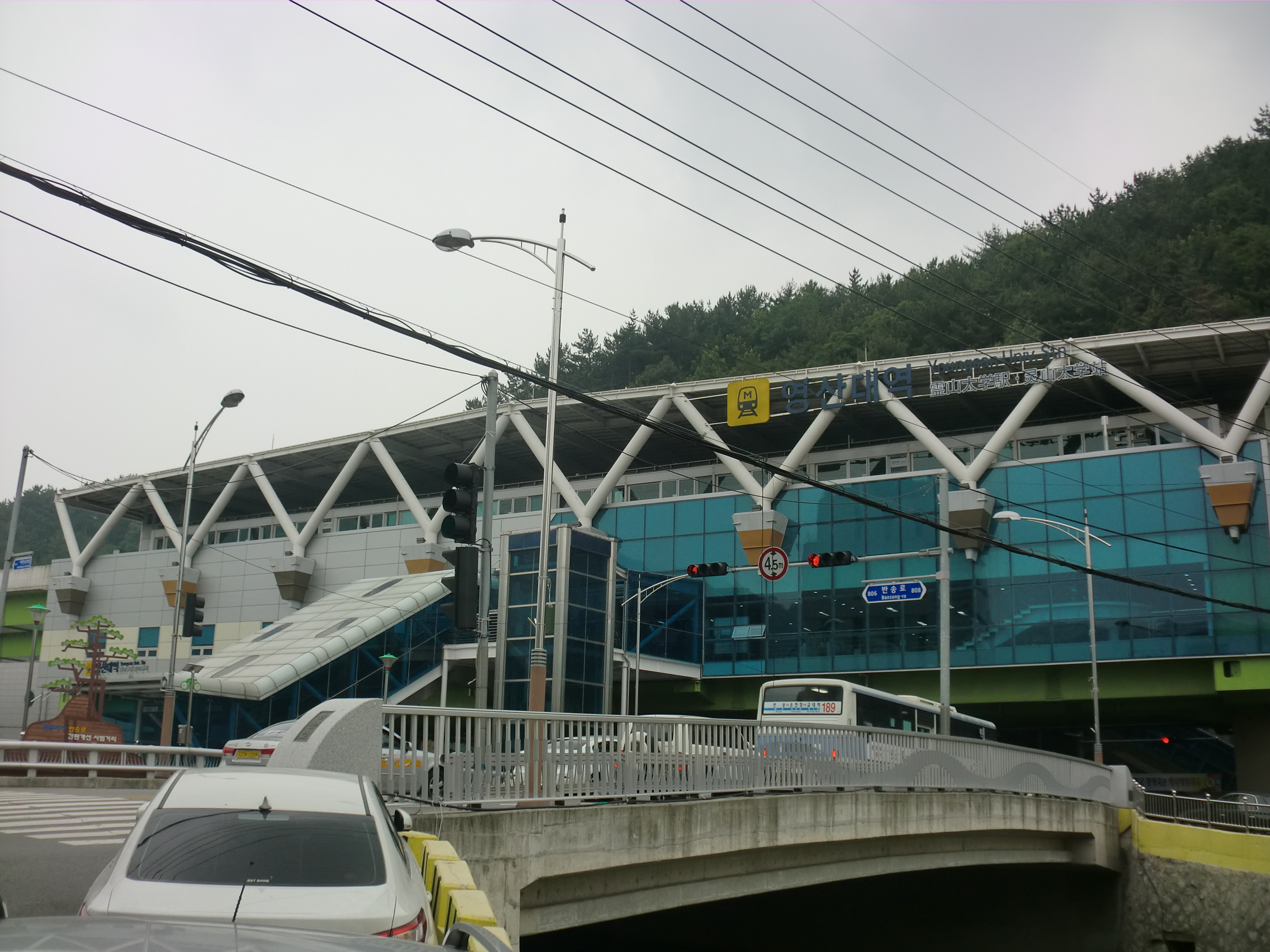 부산도시철도 4호선 영산대역